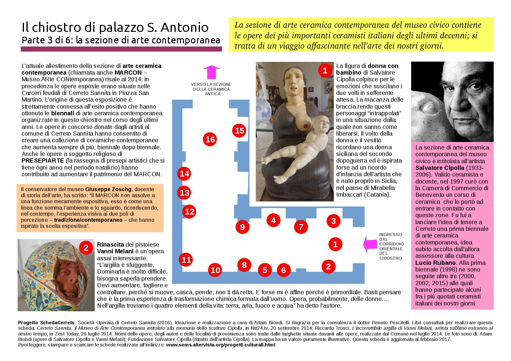 Mappa del museo civico e della ceramica cerretese, sezione di arte ceramica contemporanea.